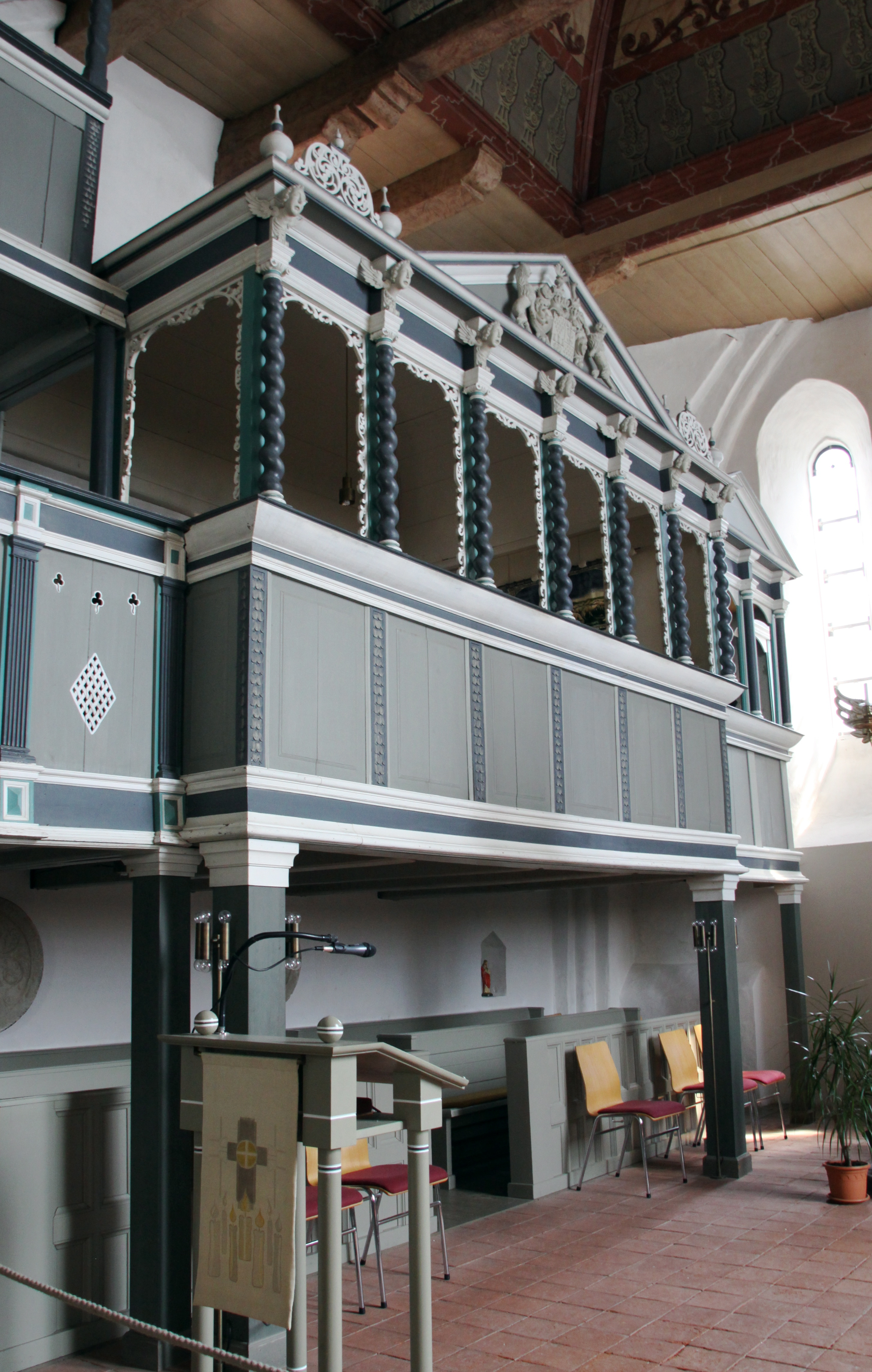 St.-Bartholomäus-Kirche (Dornum) Herrengestühl